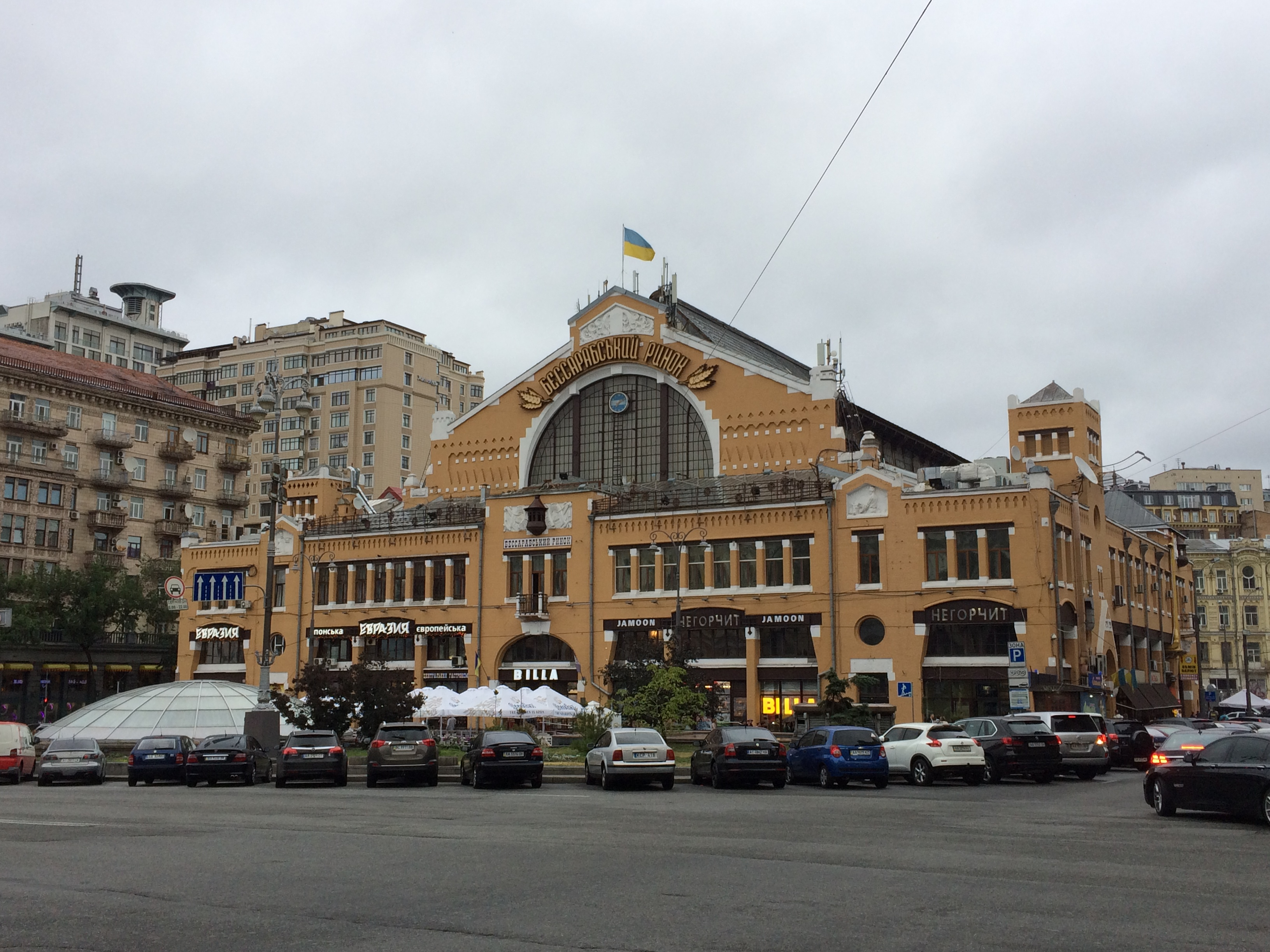 Ринок критий («Бесарабський»), Київ, пл. Бессарабська, 2